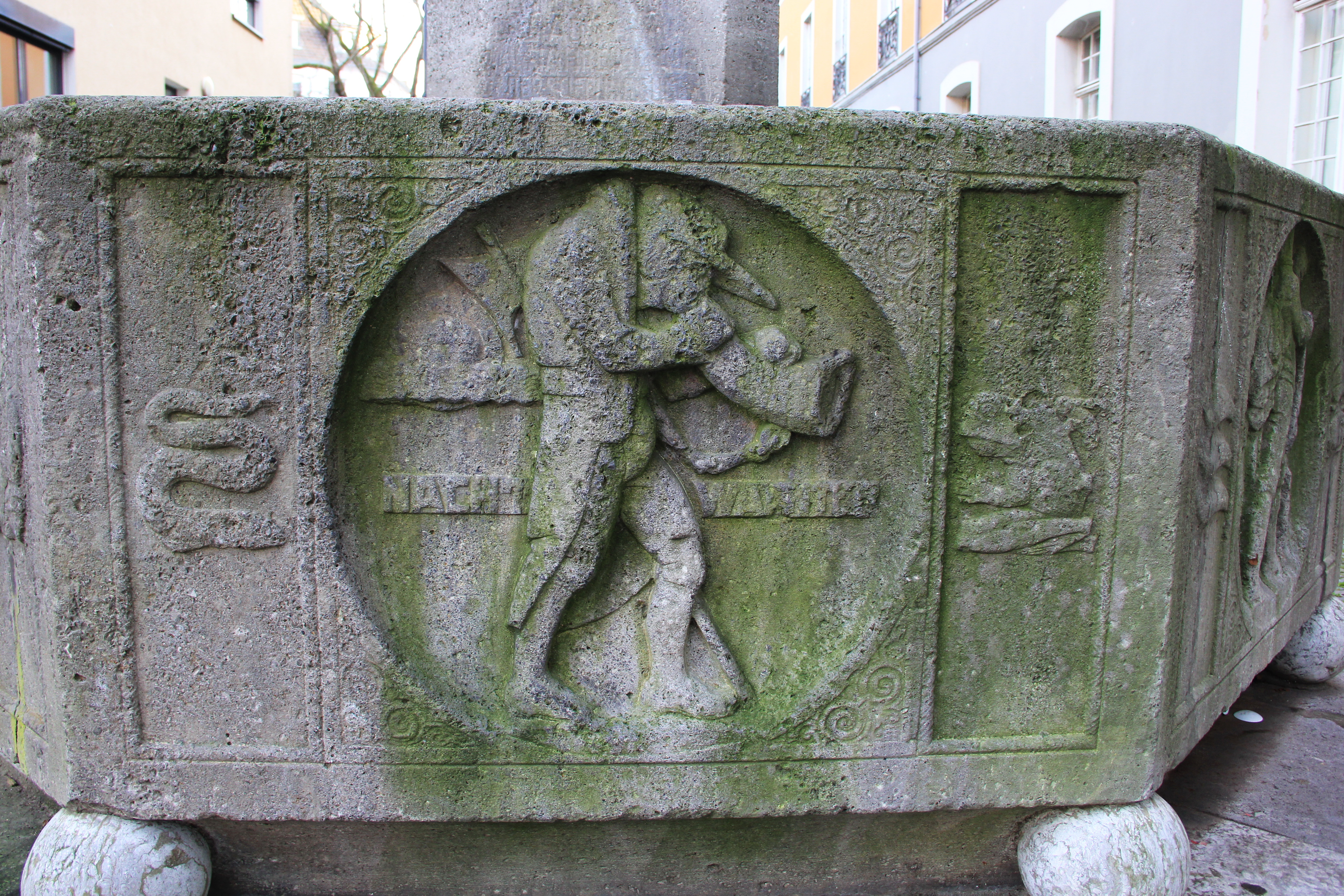 Carl Burger: Studentenbrunnen (1913) 1985 Restauration und Wiederaufbau des Brunnens – Steinmetzarbeiten C. Meisen. Detailansicht (In den vier Feldern der Brunnensäule sind im Relief Personifikationen der vier Fakultäten (Theologie, Philosophie, Jurisprudenz, Medizin) zu sehen, darunter die Wappen der Universität, der Stadt Bonn, der Rheinprovinz und des Deutschen Reiches, ferner an den Wangen des polygonalen Brunnenbeckens Reliefs, die sich auf die Gaststätten „Lindenwirtin“ und „Im schwarzen Walfisch zu Askalon“ beziehen, sowie Darstellungen der Nachtwache, des Wandervogels, der Mensur, der Studentin, des Studenten und des Sports. (Quelle: Bonn in der Kaiserzeit 1871-1914, Festschrift))